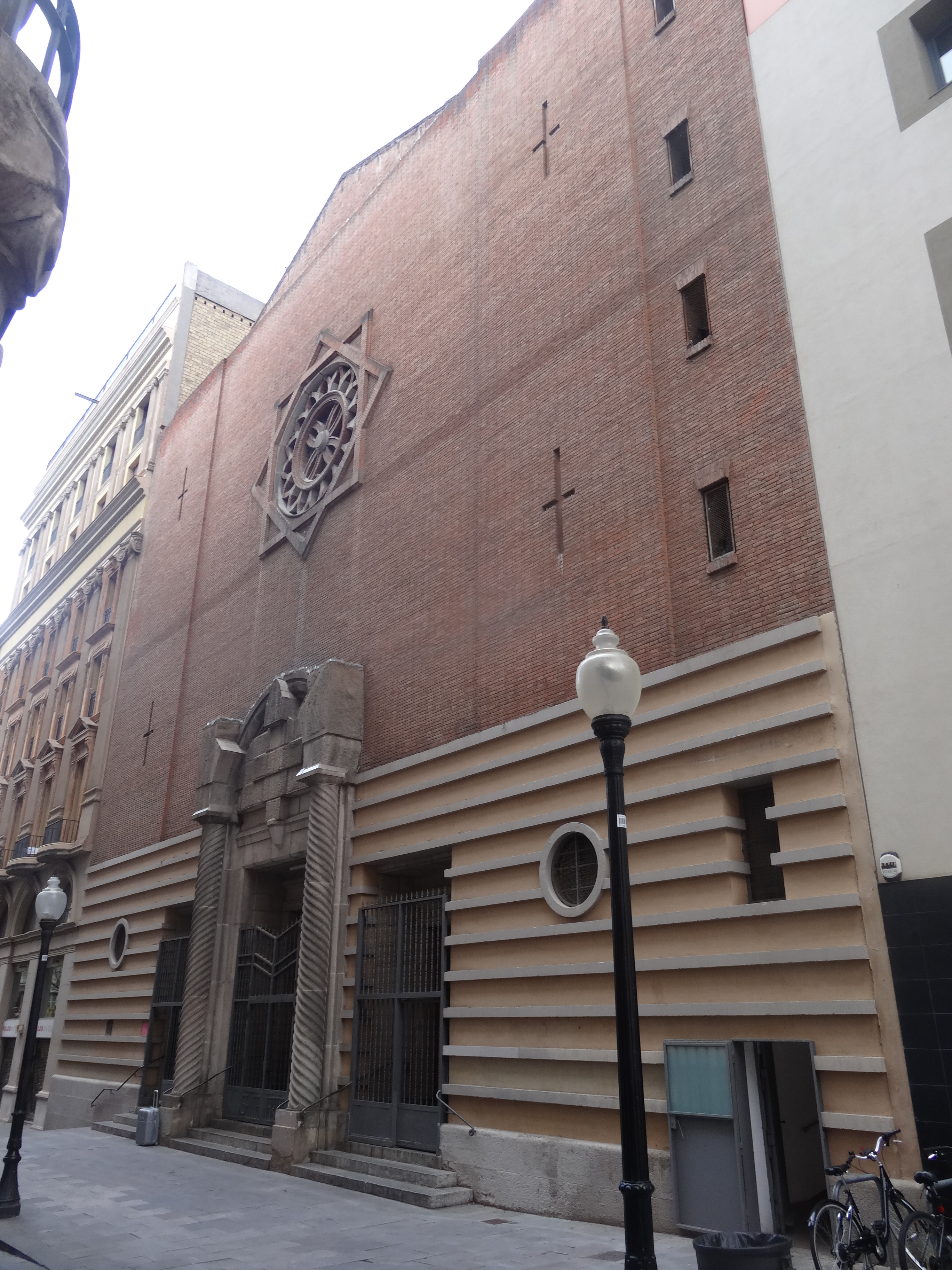 Parròquia de Santa Maria de Gràcia, Barcelona. Al carrer de Gràcia, 3-5.